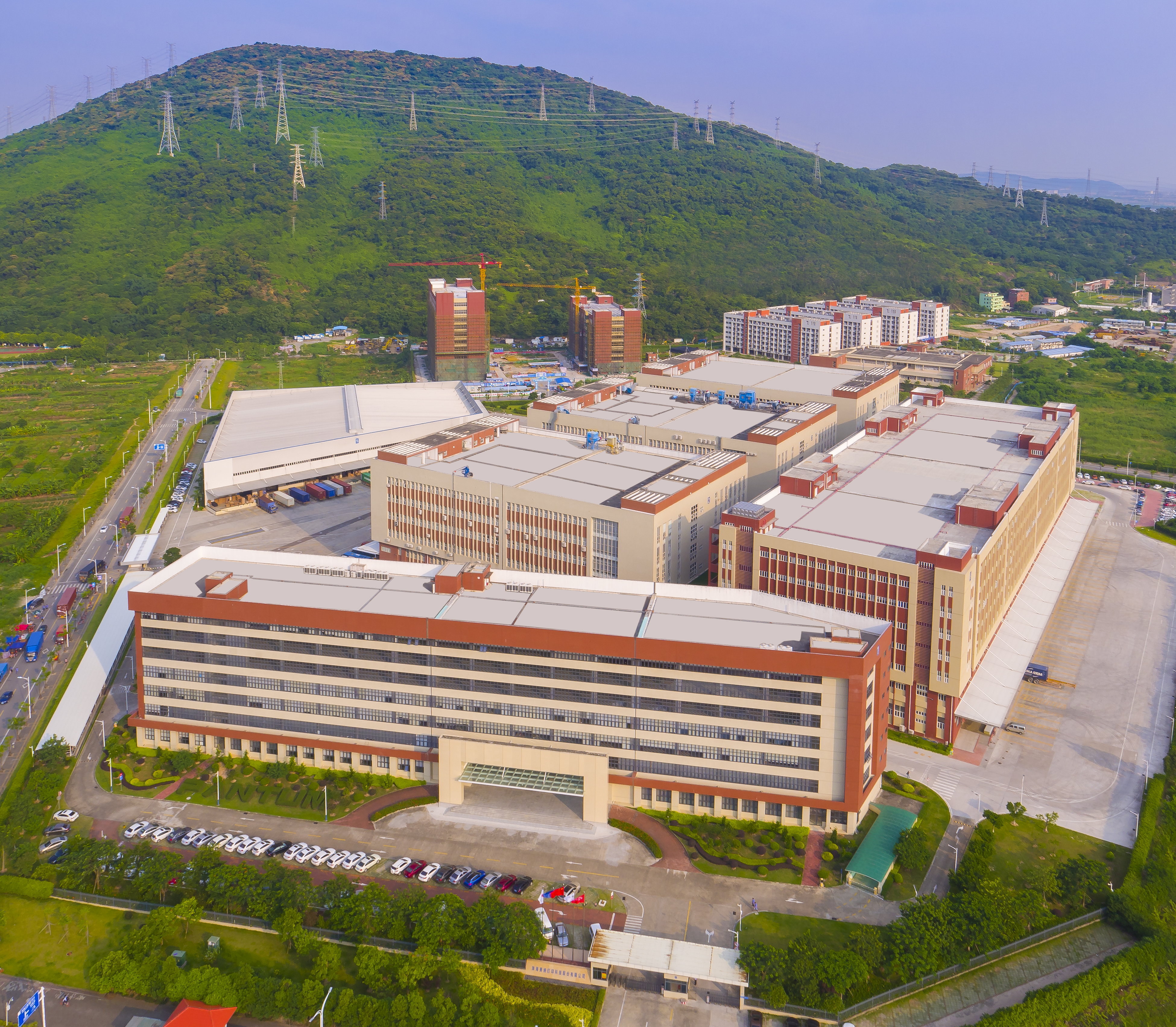 Auf diesem 450.000 Quadratmeter großen Gelände befinden sich die Büros (das vordere Gebäude) und die Fabriken (die Gebäude in der Mitte und rechts), die Logistik (das niedrigere Gebäude auf der linken Seite) und Wohnungen für Mitarbeiter (die vier Gebäude im Hintergrund).